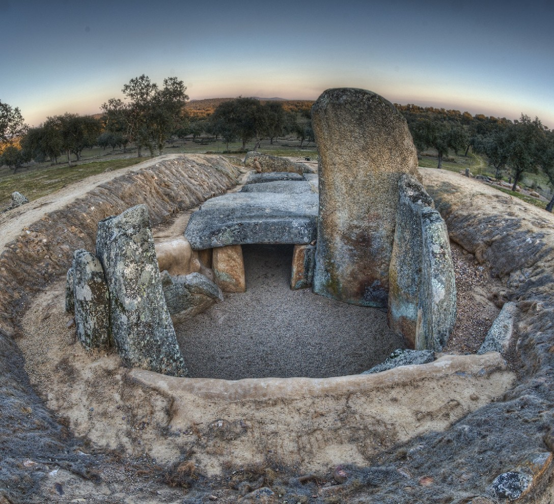 Este dolmen, fechado entre los 3000 y 4000 a.C., fue utilizado como como sepulcro en la Edad del Bronce. La foto muestra el aspecto general, con la cámara en primer plano. La gran piedra a la derecha del corredor es la única que queda intacta. La cámara estaba cubierta con grandes losas y el conjunto tapado con tierra formando un túmulo.